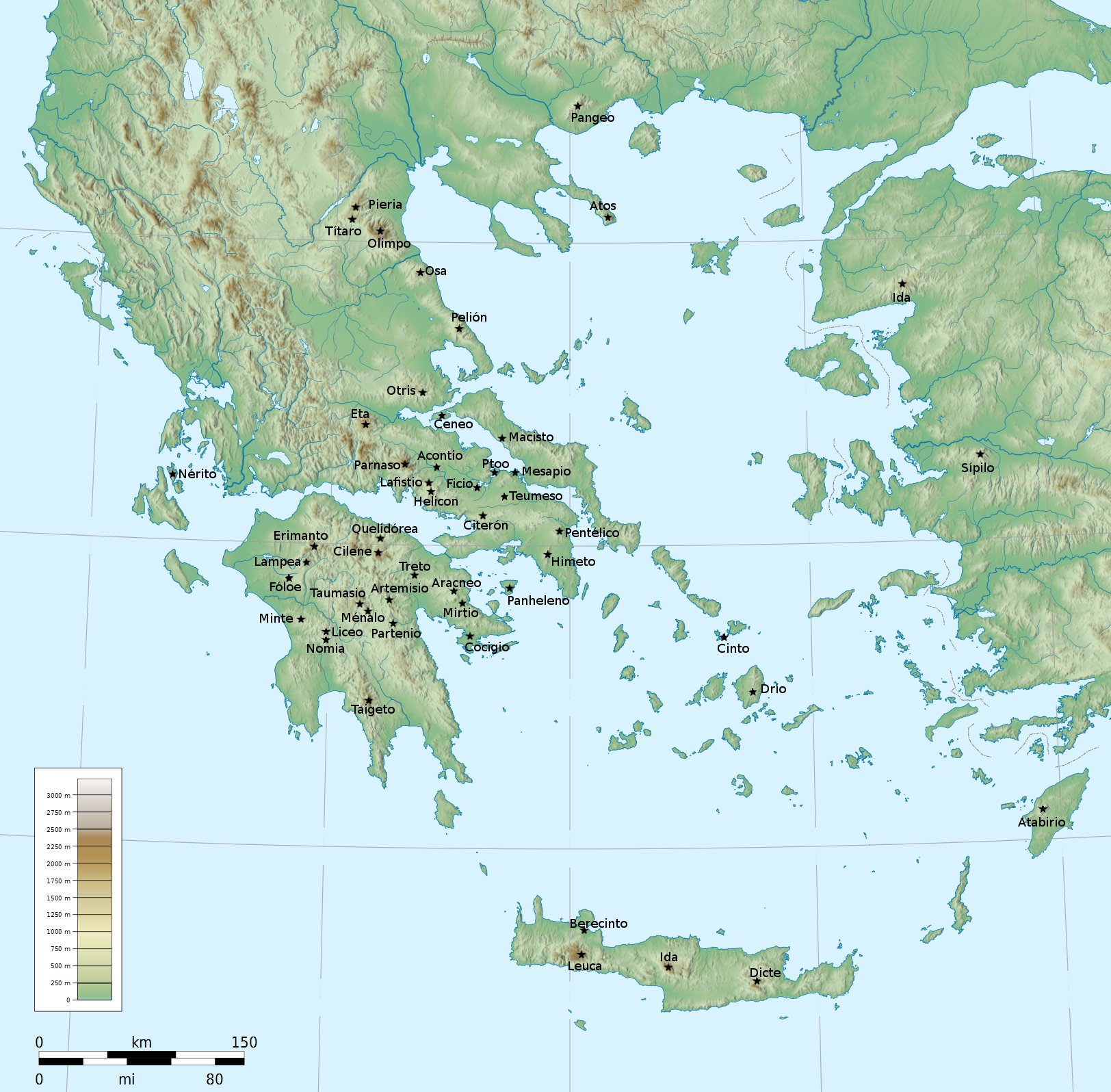 Ubicación de algunos montes que aparecen como escenario de mitos griegos o como lugares de culto.